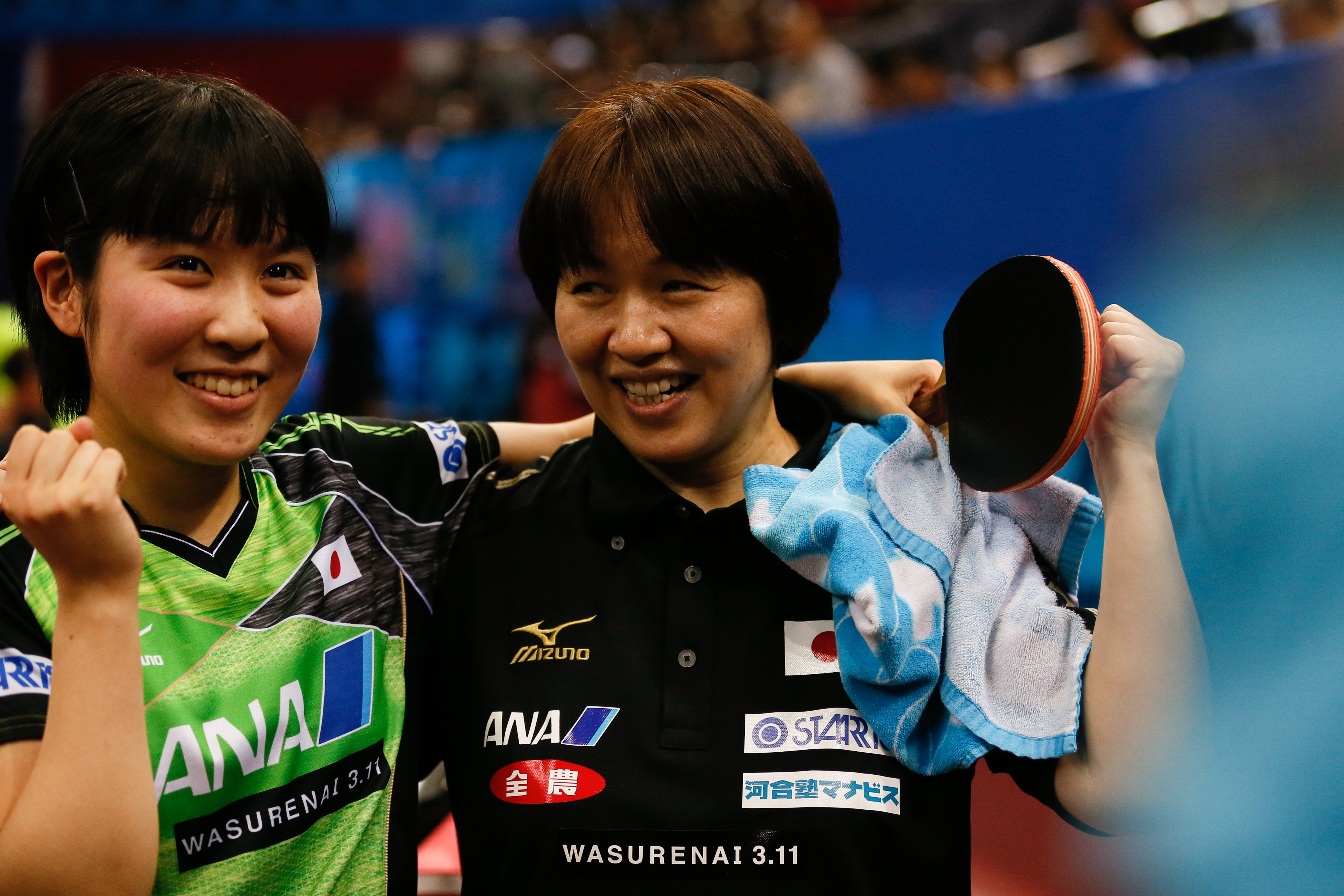 _K0K1380